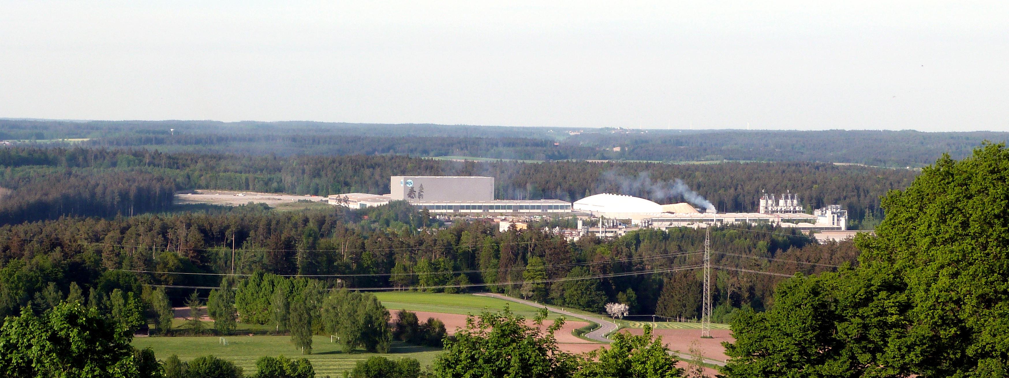 J. Rettenmaier & Söhne, Teil des Werks Rosenberg-Holzmühle vom Hohenberg aus aufgenommen